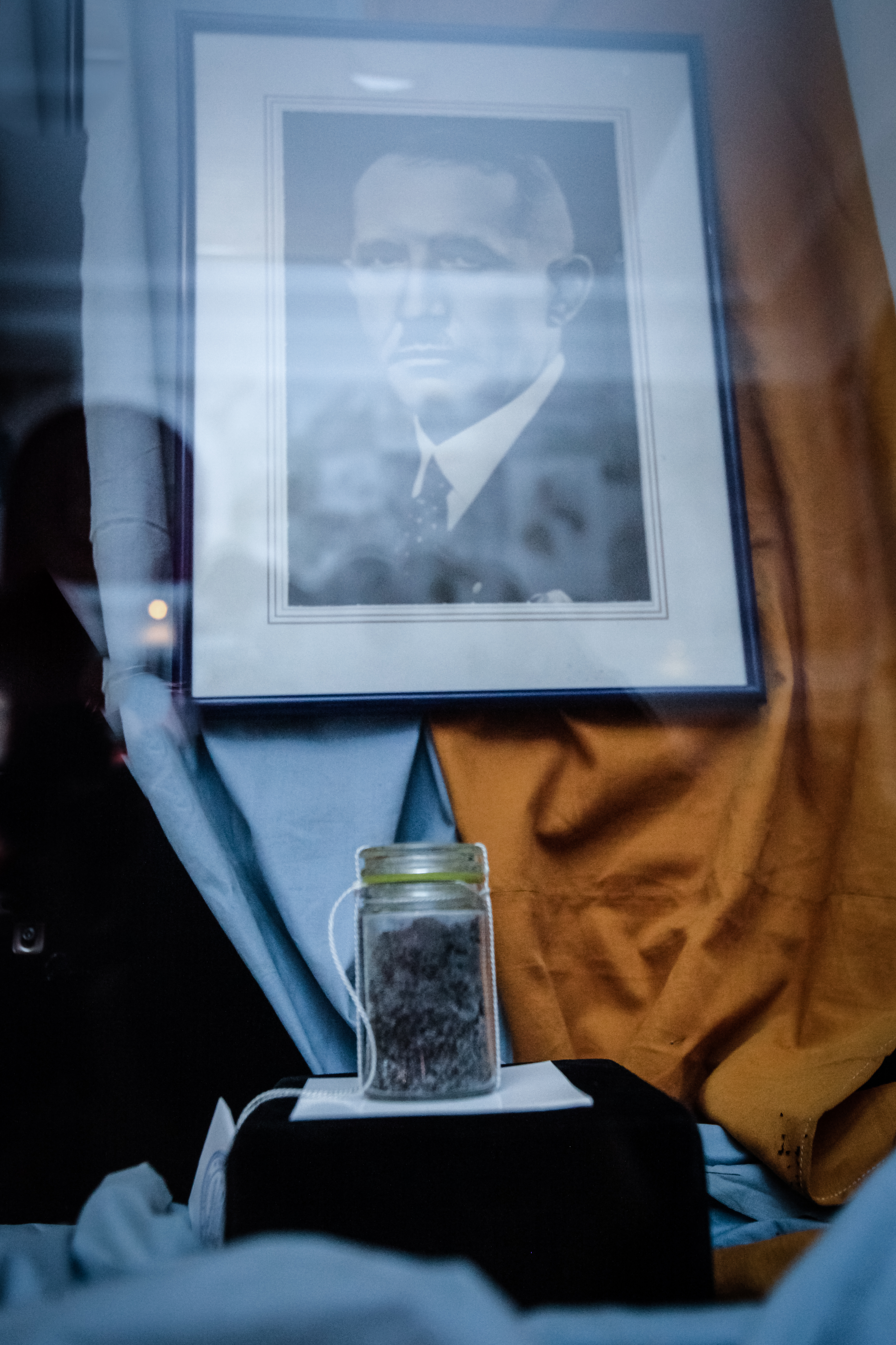 Капсула з землею з могили Євгена Коновальця у відділі «Музей Української революції 1917-1921 років» Національного музею історії України. У день урочистої передачі до музею.